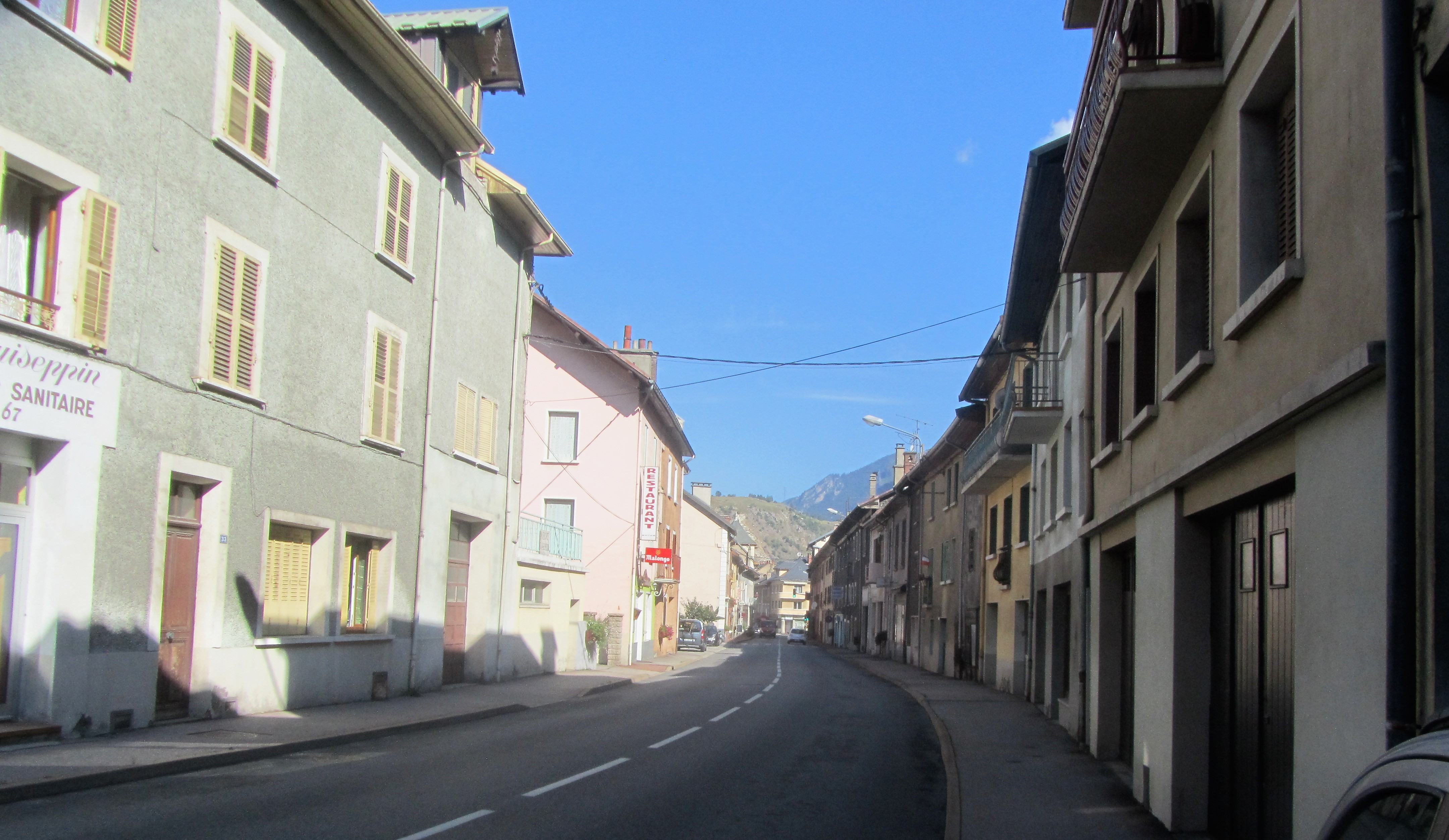 La rue centrale (ex RN6) de Saint-Michel-de-Maurienne, en 2018.